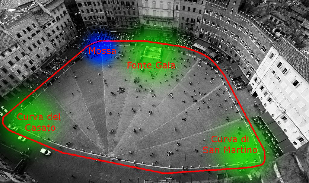 Ganzer Piazza del Campo in Siena vom Torre del Mangia . Besteht aus 20 Bildern